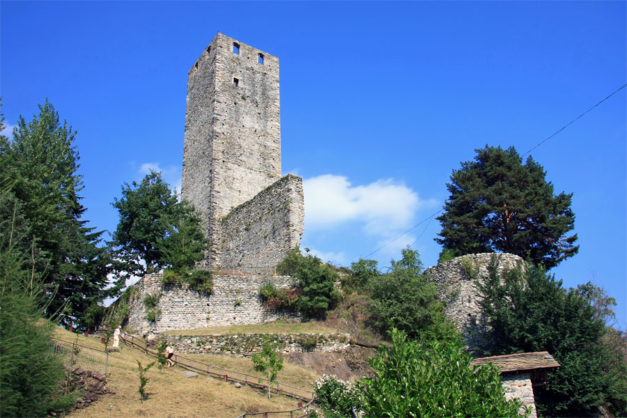 Torre Ferranda e resti del castello di Pont Canavese (TO)